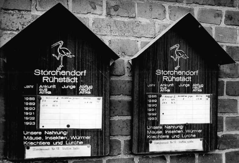 Rühstädt, Hinweisschilder auf Störche ADN-ZB Pätzold-12.4.89-We-Schwerin: Naturschutz- Ungewöhnliche Hausschilder zieren die Gemeinde Rühstädt im Kreis Perleberg. In diesen Tagen werden die Hinweistafeln mit den Ankunftsdaten der Storchenpaare aktualisiert und informieren dann die vielen Interessierten aus dem In- und Ausland, die in den Sommermonaten in das rund 350 Einwohner und über 20 Storchenpaare zählende Prignitzdorf kommen.